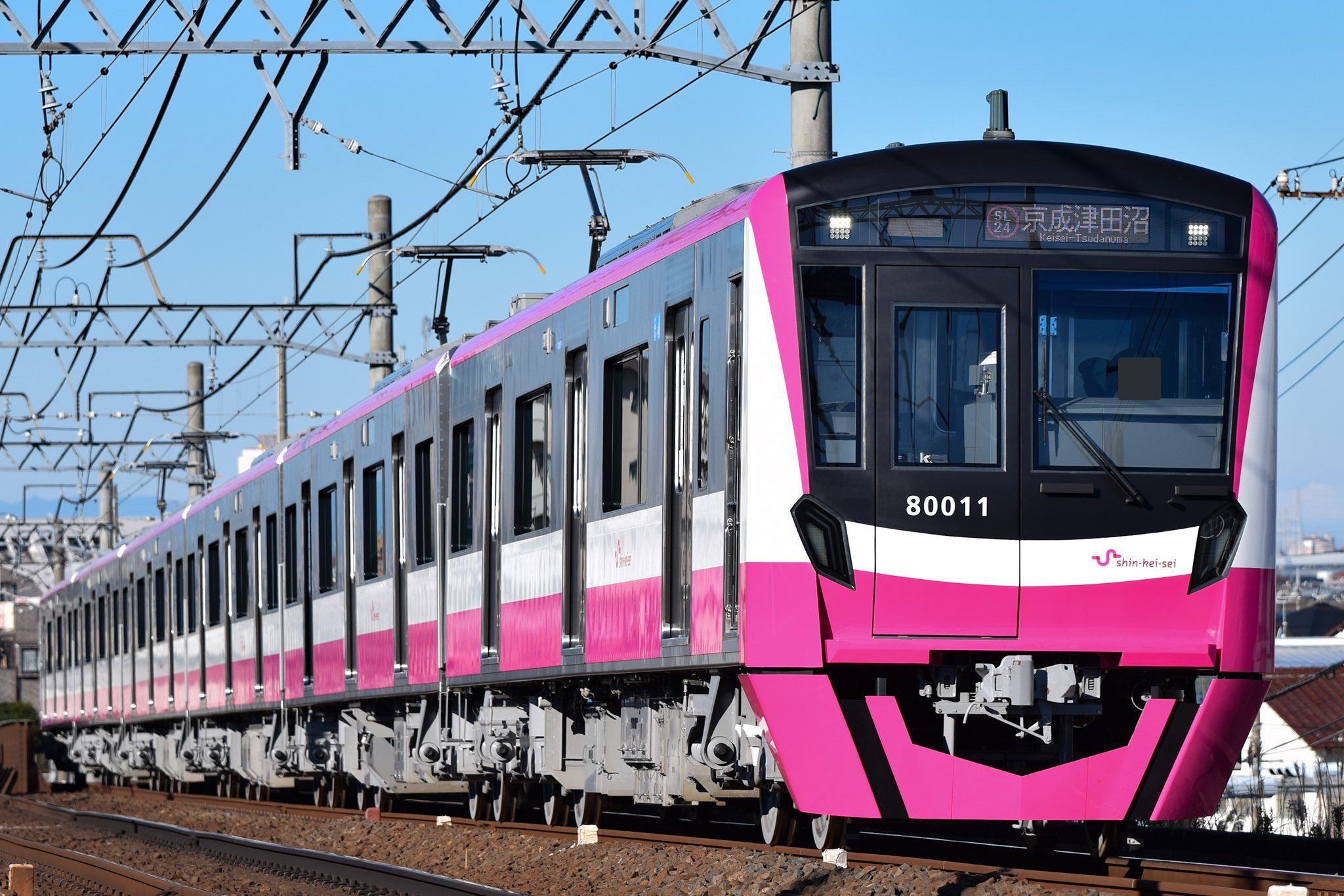 新京成電鉄80000形80016編成 普通京成津田沼行き